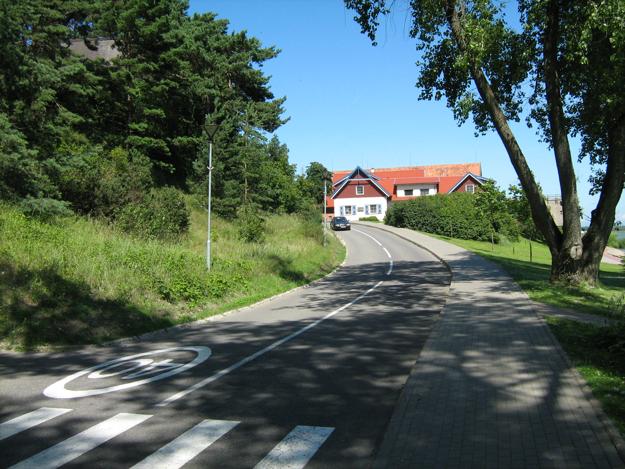 Gatvė Nidoje